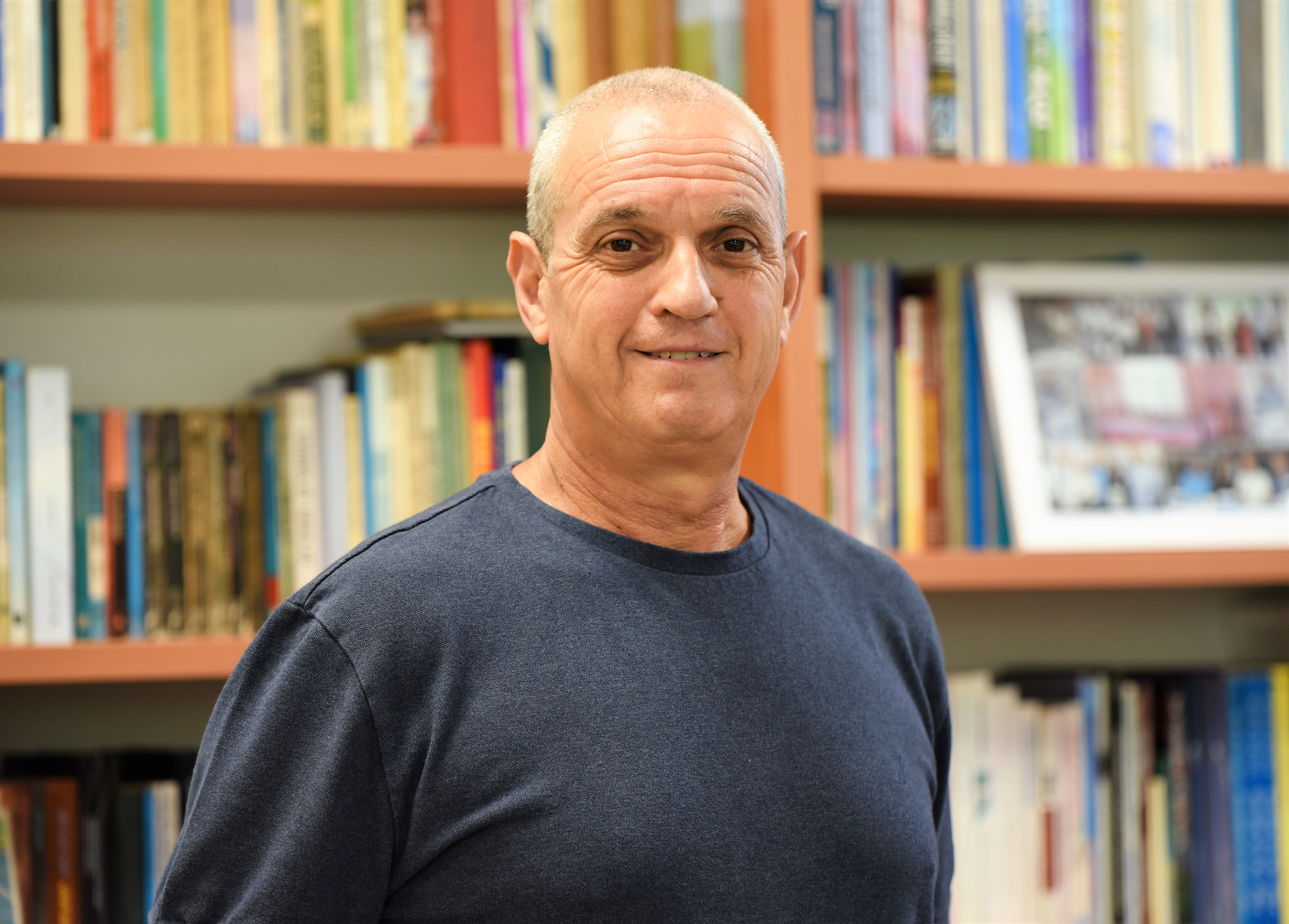 פרופ' רוני לידור, נשיא המכללה האקדמית בוינגייט